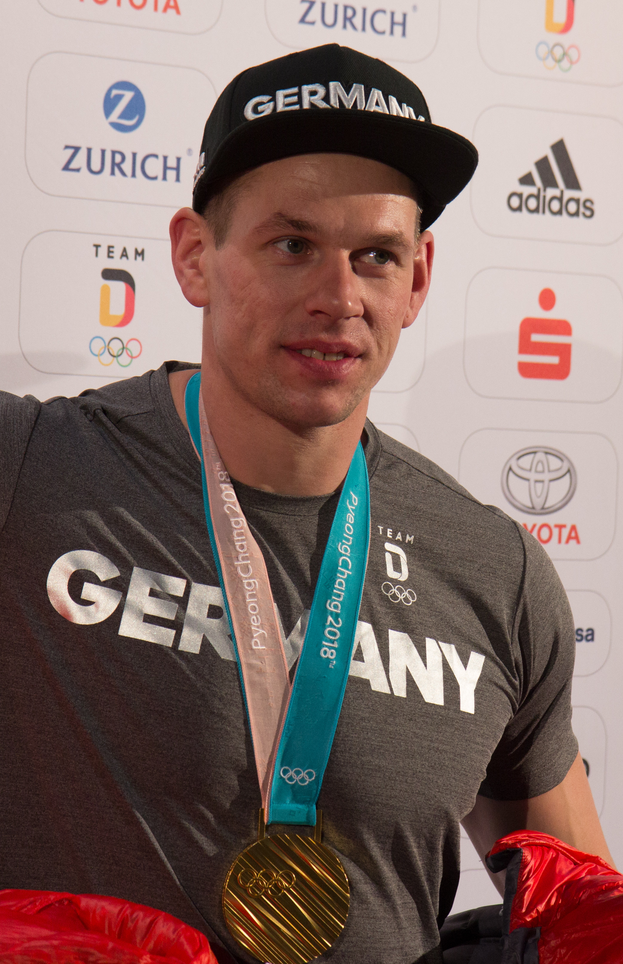 Ankunft der deutschen Olympiamannschaft am 26. Februar 2018 mit Flug LH713 auf dem Frankfurter Flughafen.